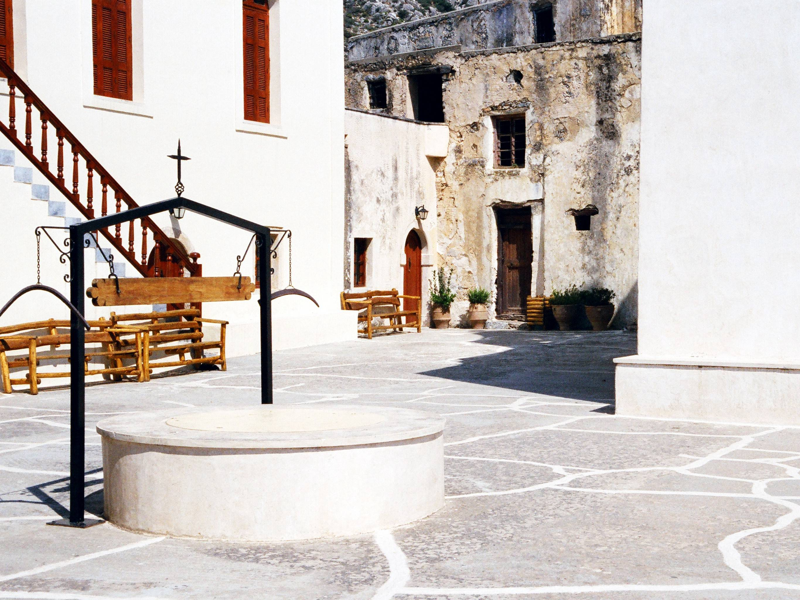 Mönchskloster Moni Preveli, Kreta (Griechenland)